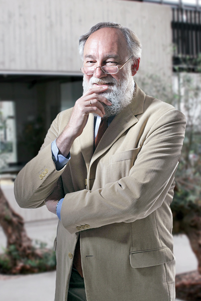 Peter Kruse